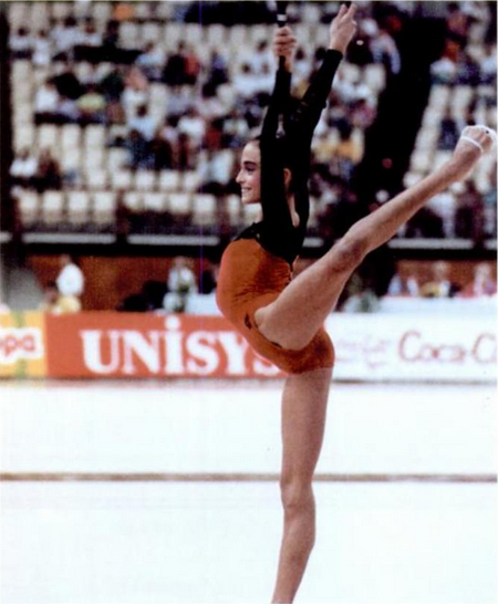 Carolina Pascual en el Campeonato Mundial de Gimnasia Rítmica de Atenas en 1991.